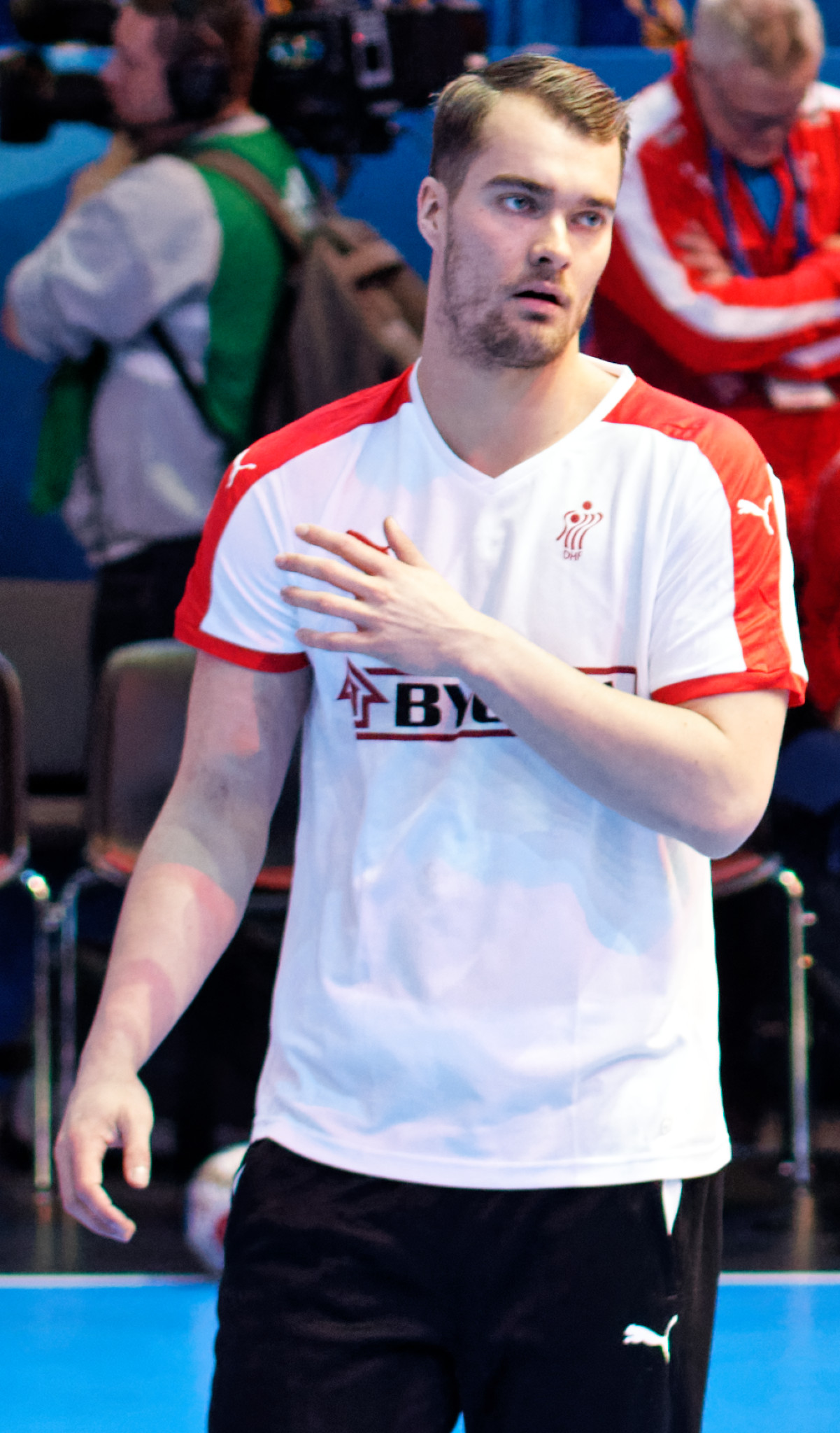 Match de la phase préliminaire du championnat du monde masculin de handball 2017 entre l'Egypte et le Danemark (Groupe D). A Bercy, le 14 janvier 2017.